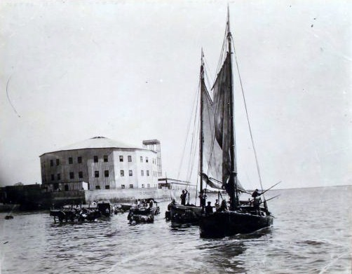 Primer edificio del hotel de Inmigrantes en Buenos Aires, estaba en la costa de Retiro, cerca de la actual Terminal de Ómnibus, sobre las orillas del río de la Plata. En el siglo XX fue reemplazado por el edificio actual.